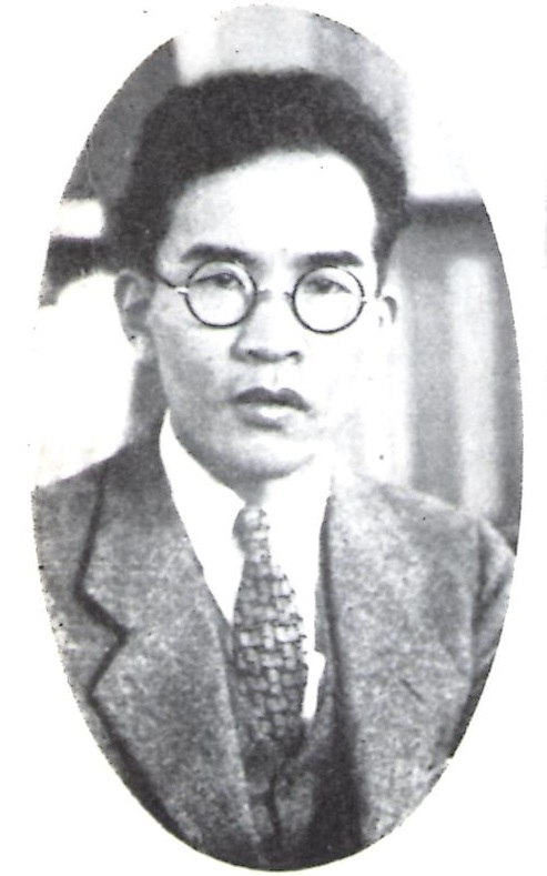 昭和7年、札幌放送局が出版した『北海道郷土史研究』に掲載。 This photographic image was published before December 31st 1956, or photographed before 1946, under the jurisdiction of the Government of Japan. Thus this photographic image is considered to be public domain according to article 23 of old copyright law of Japan (English translation) and article 2 of supplemental provision of copyright law of Japan. To uploader: Please provide an image source.